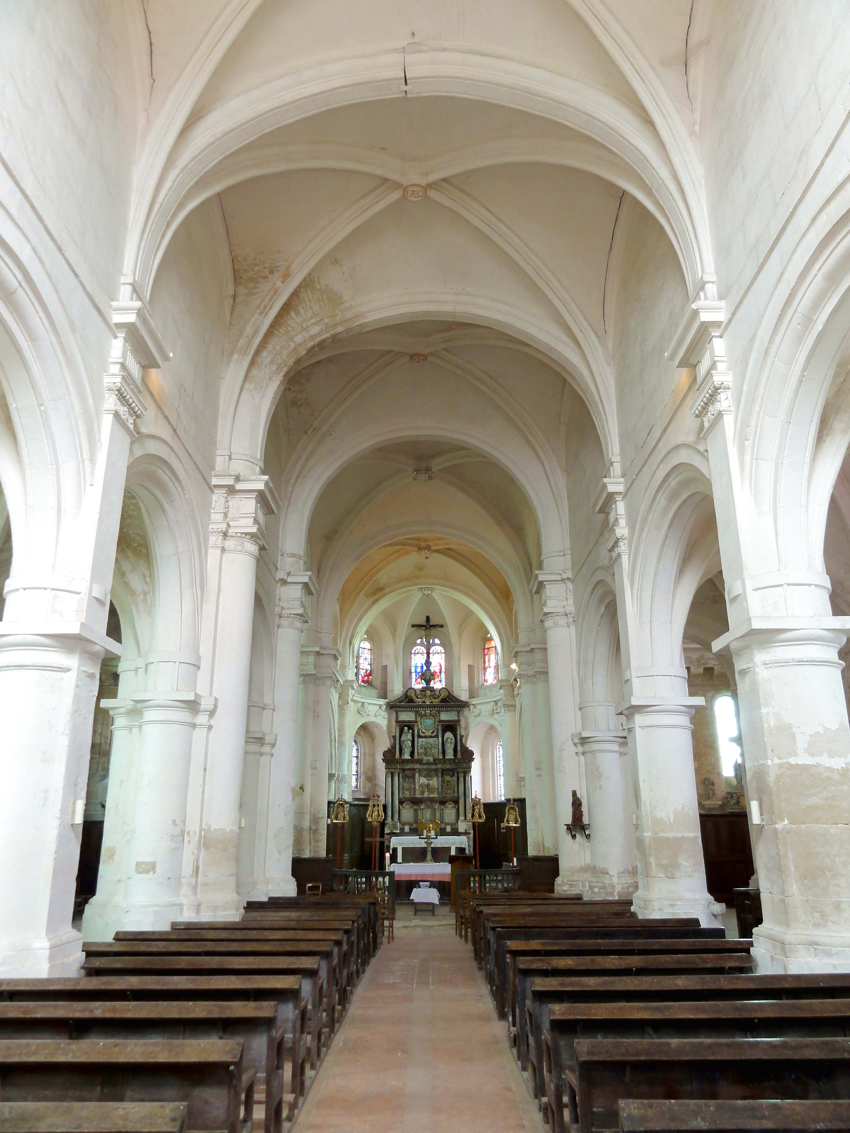 Intérieur de l'église (voir titre).